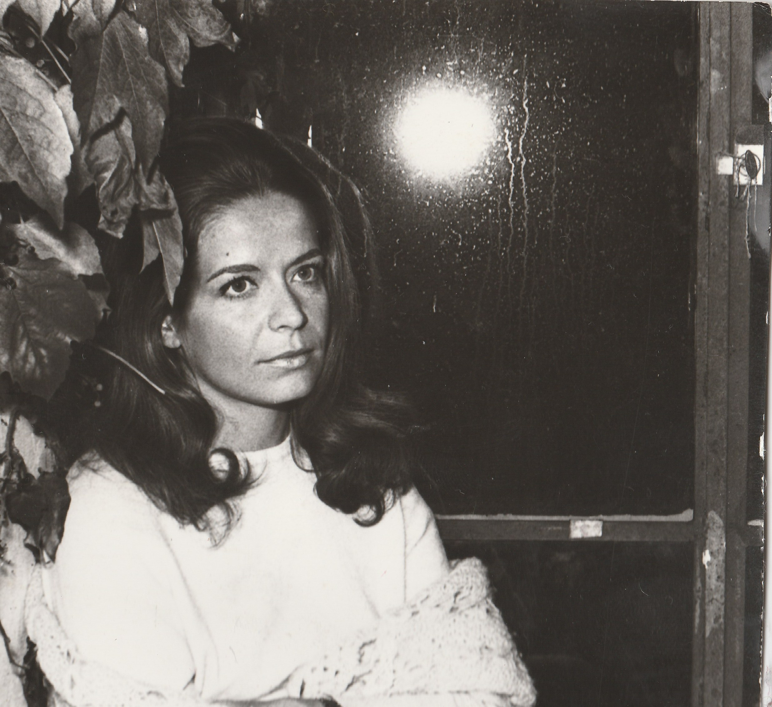 Simona Weller